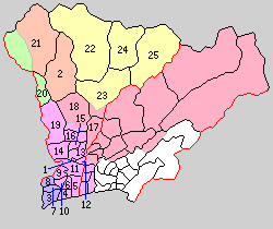 高知県長岡郡の町村制時点の町村。